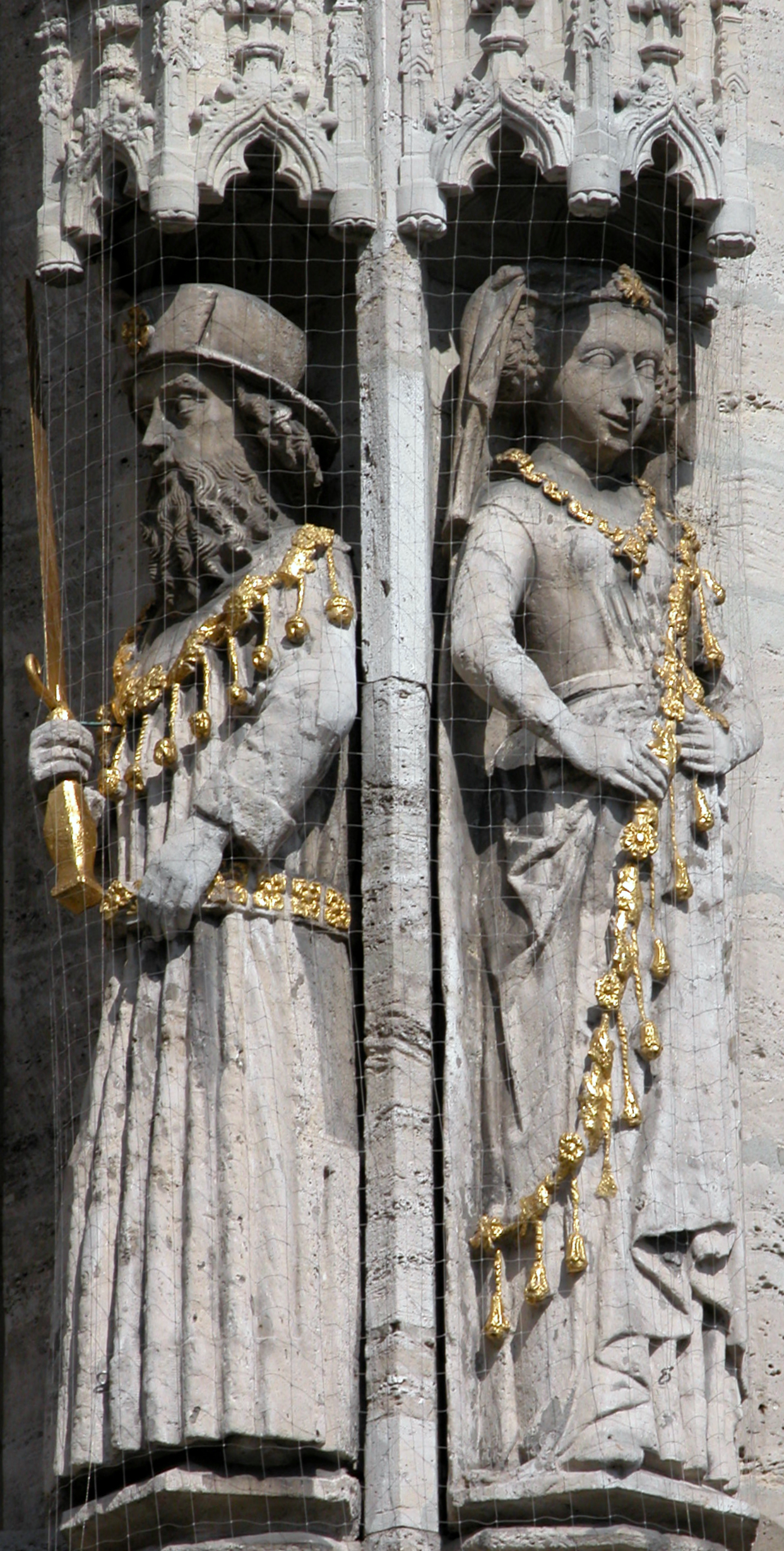 Braunschweig, Altstadtrathaus: Statue Heinrichs des Löwen und seiner zweiten Frau Mathilde auf der Südseite des Gebäudes.